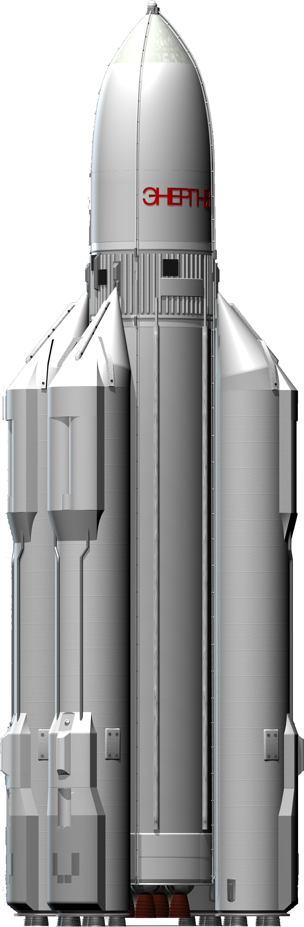 Trägersystem ENERGIJA